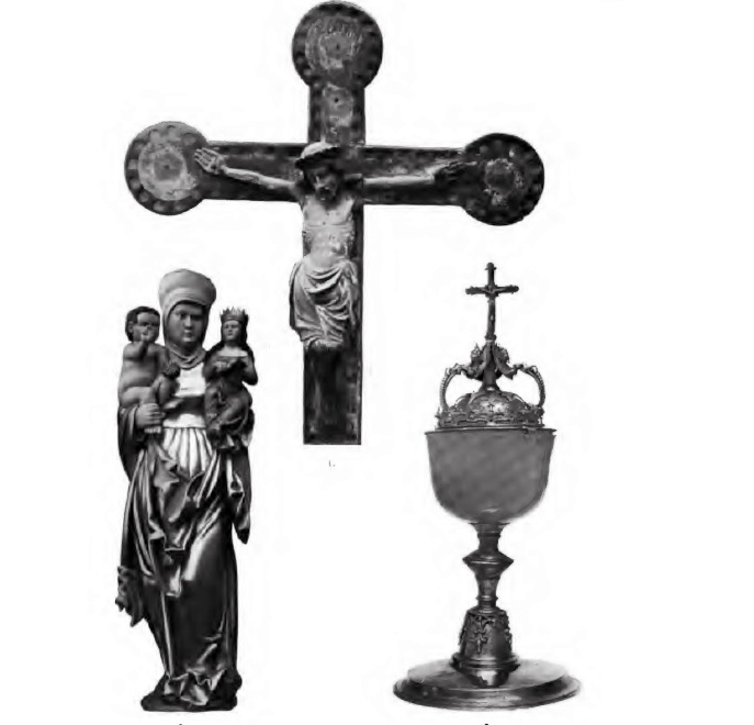 Anna selbdritt, Ziborium und Kruzifix. Foto von 1895